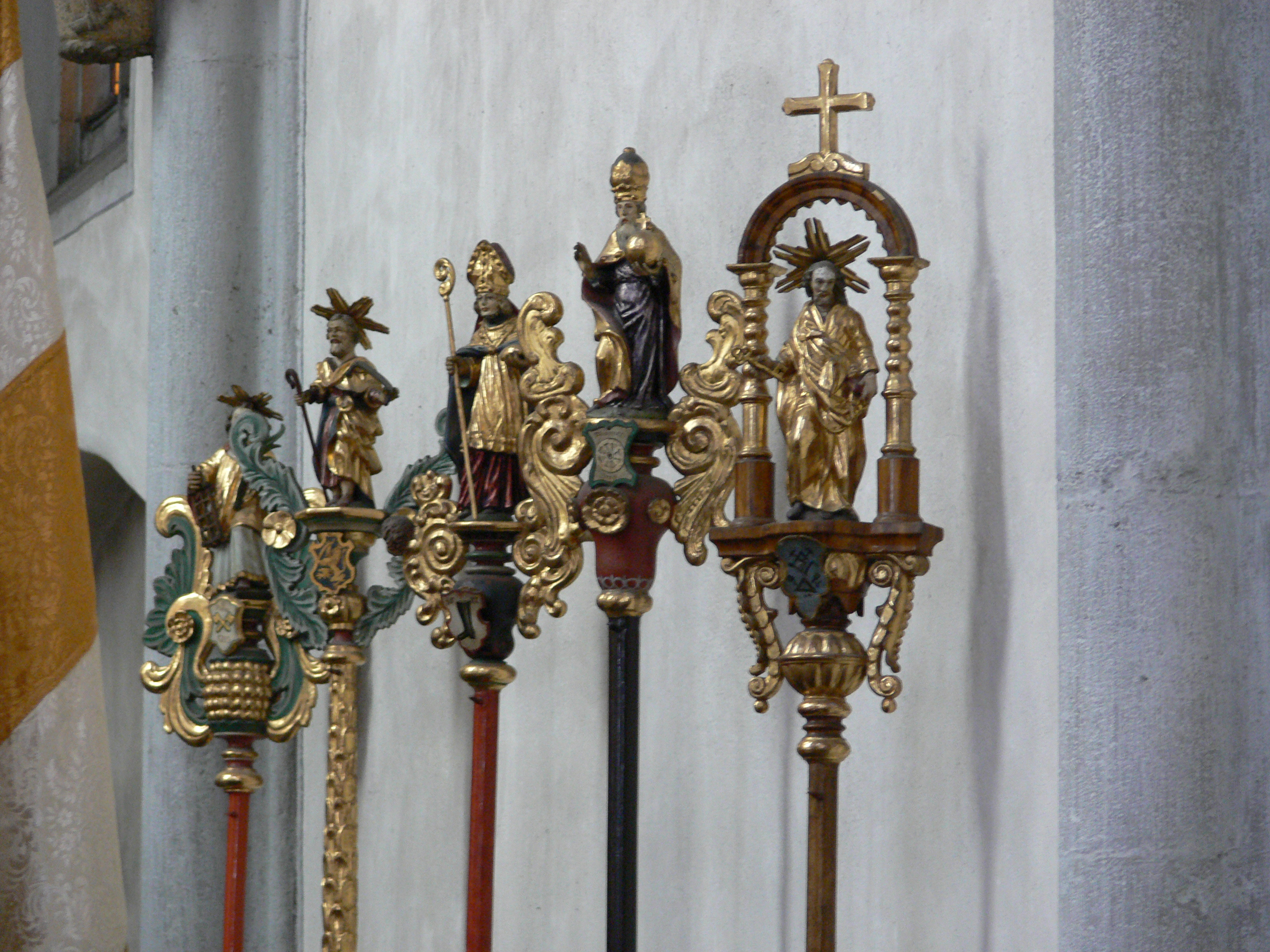 Stadtpfarrkirche St. Maria Magdalena, Münnerstadt Prozessionsstangen